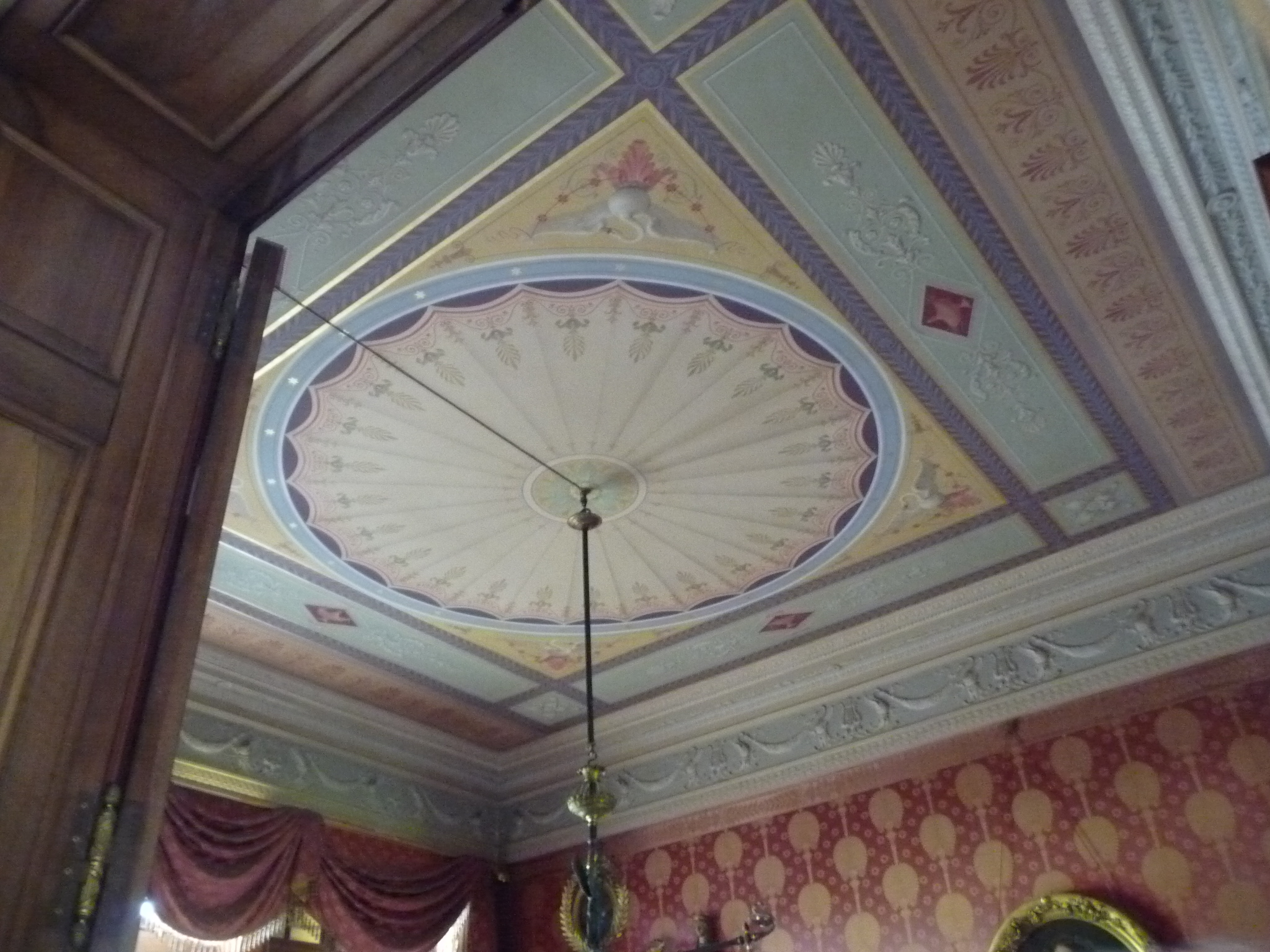 Photo de 2013.